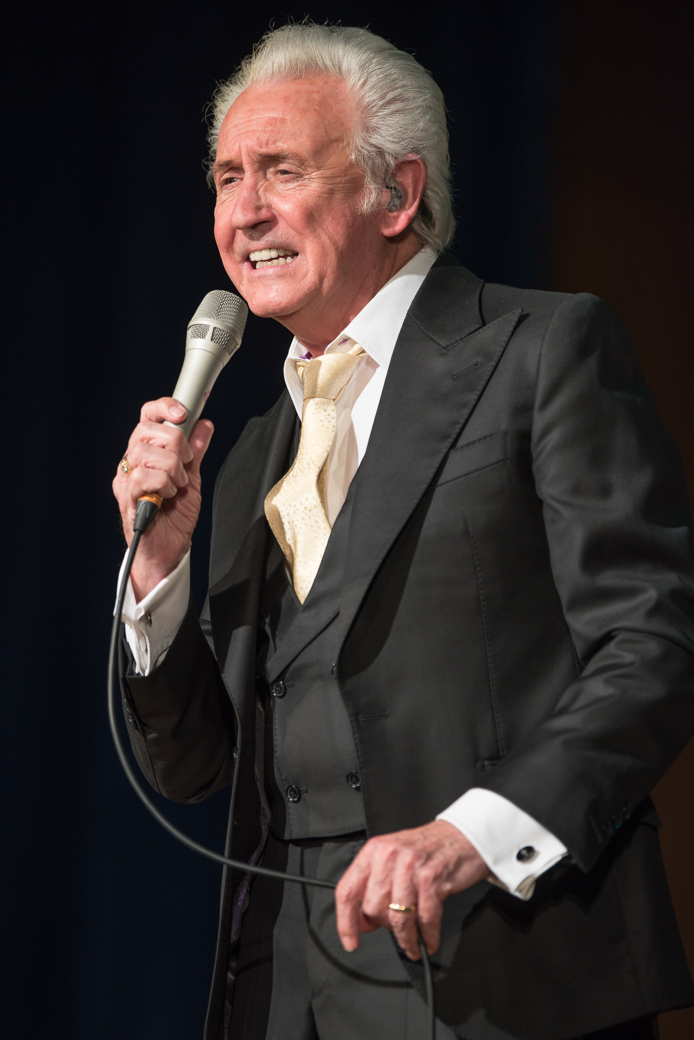 Anthony Fitzgerald,Concertbüro Franken,Konzert,Livekonzert,Livemusik,Markgrafensaal,Musik,Tony Christie